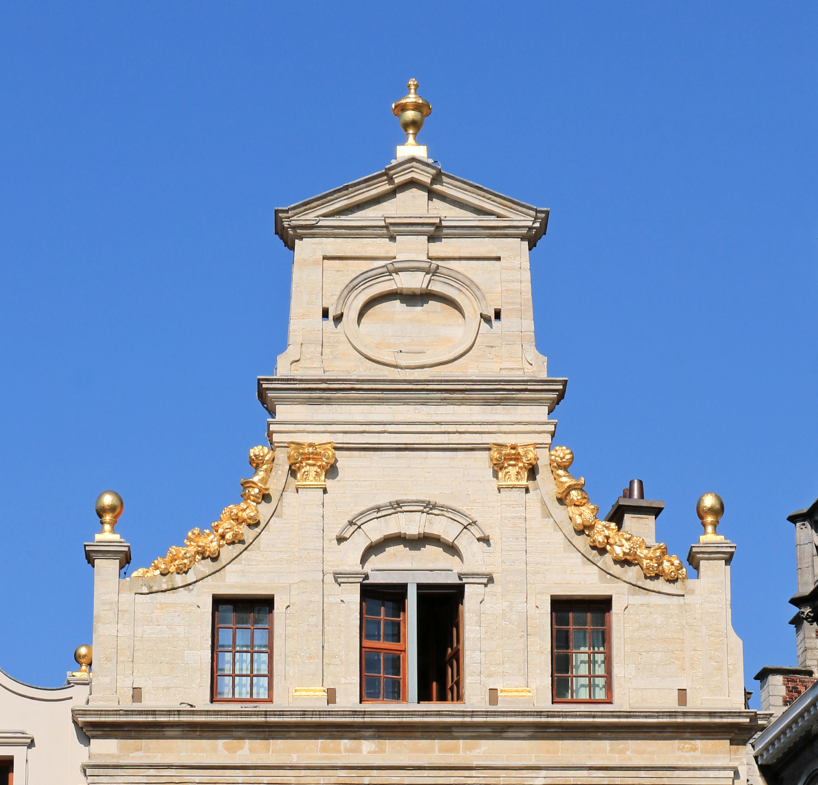 Belgique - Bruxelles - Grand-Place n° 34 - Maison du Heaume (pignon) This photo of immovable heritage has been taken in the Brussels Capital Region